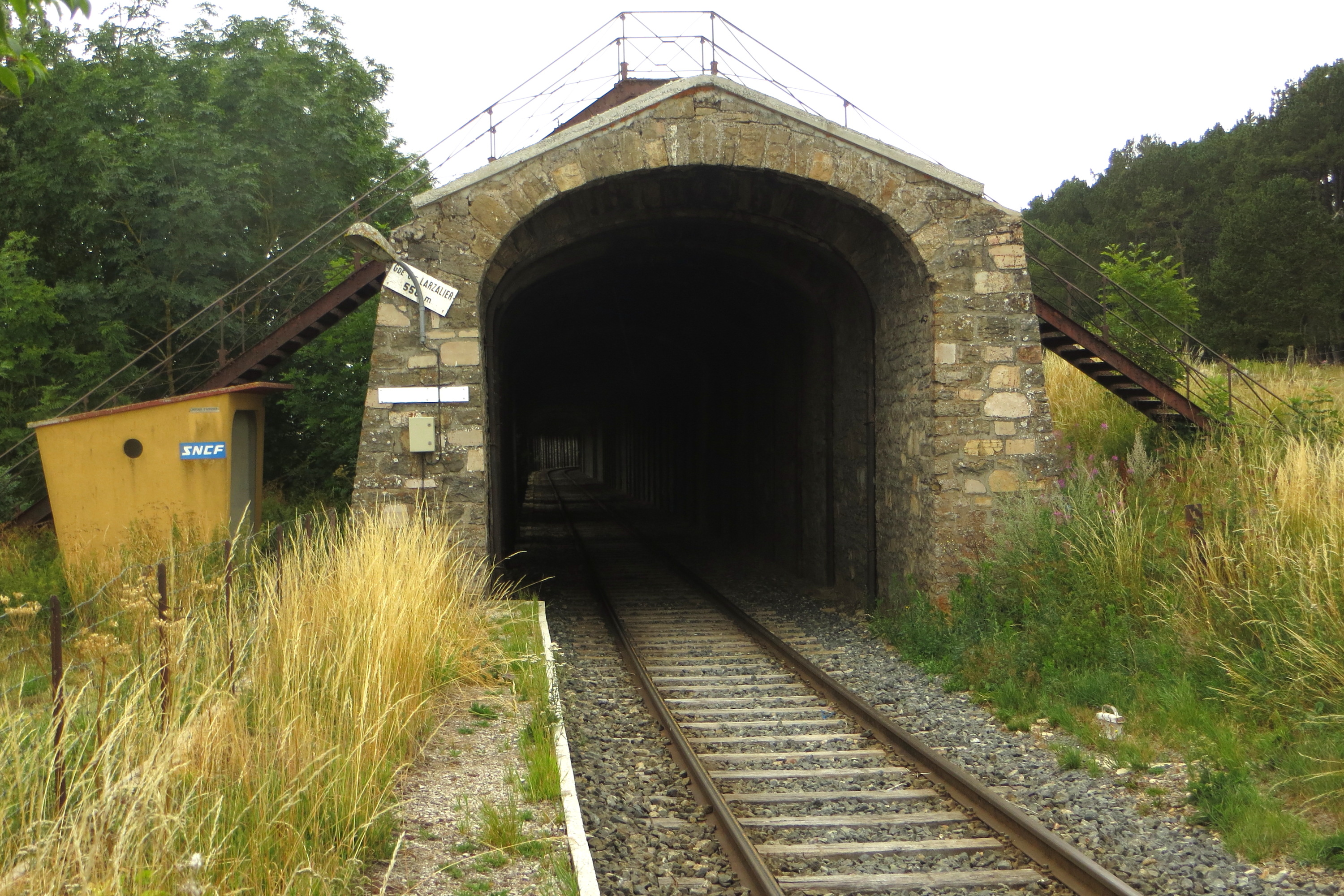 Vue sur l'ancienne halte de Larzalier, implantée entre les deux galeries (petite et grande), en direction de Mende et de la grande galerie Larzalier.